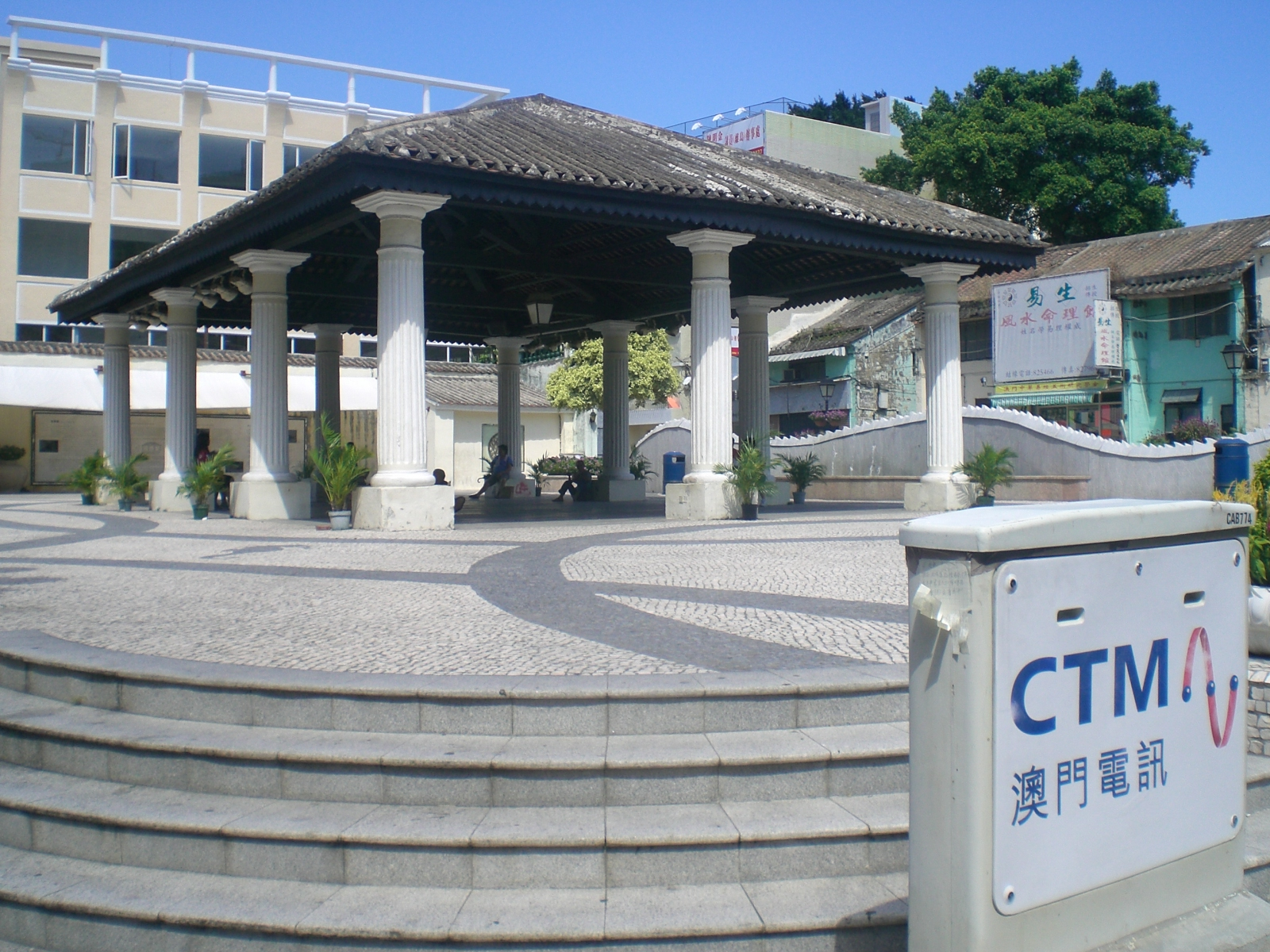 官也街, Rua do Cunha是一條位於氹仔的手信街及飲食綜合遊客區.